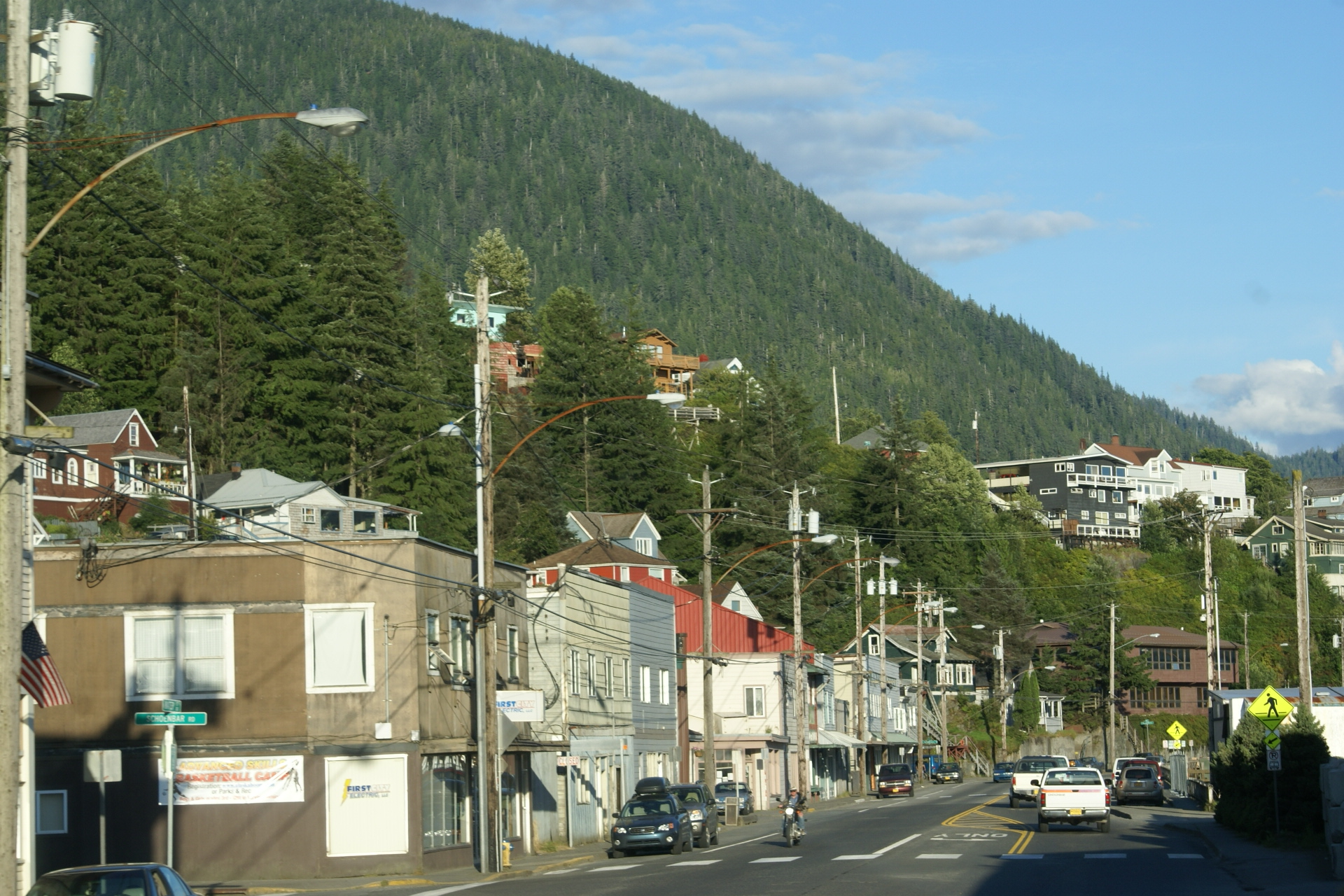 Ketchikan